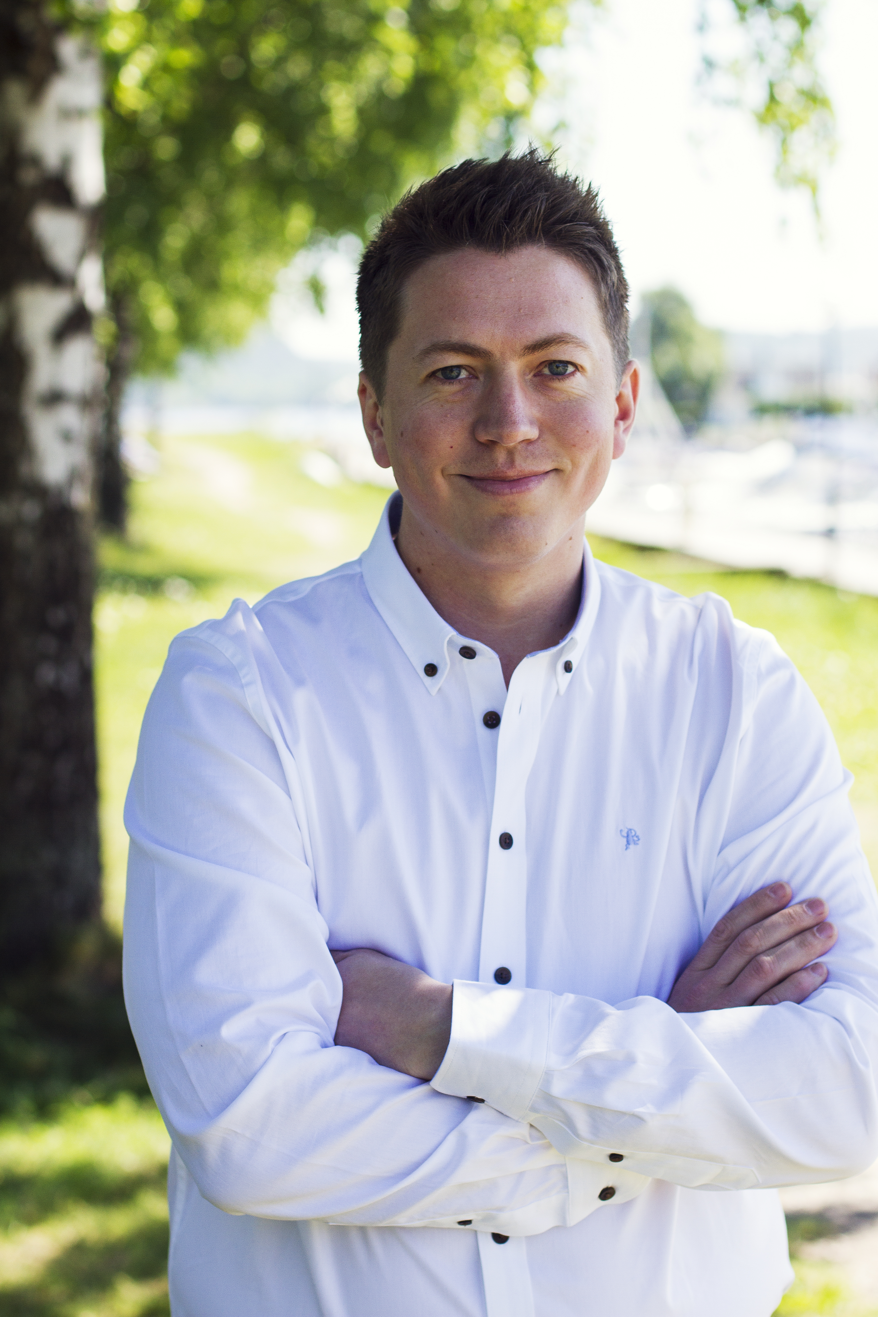 Andreas Muri (H)